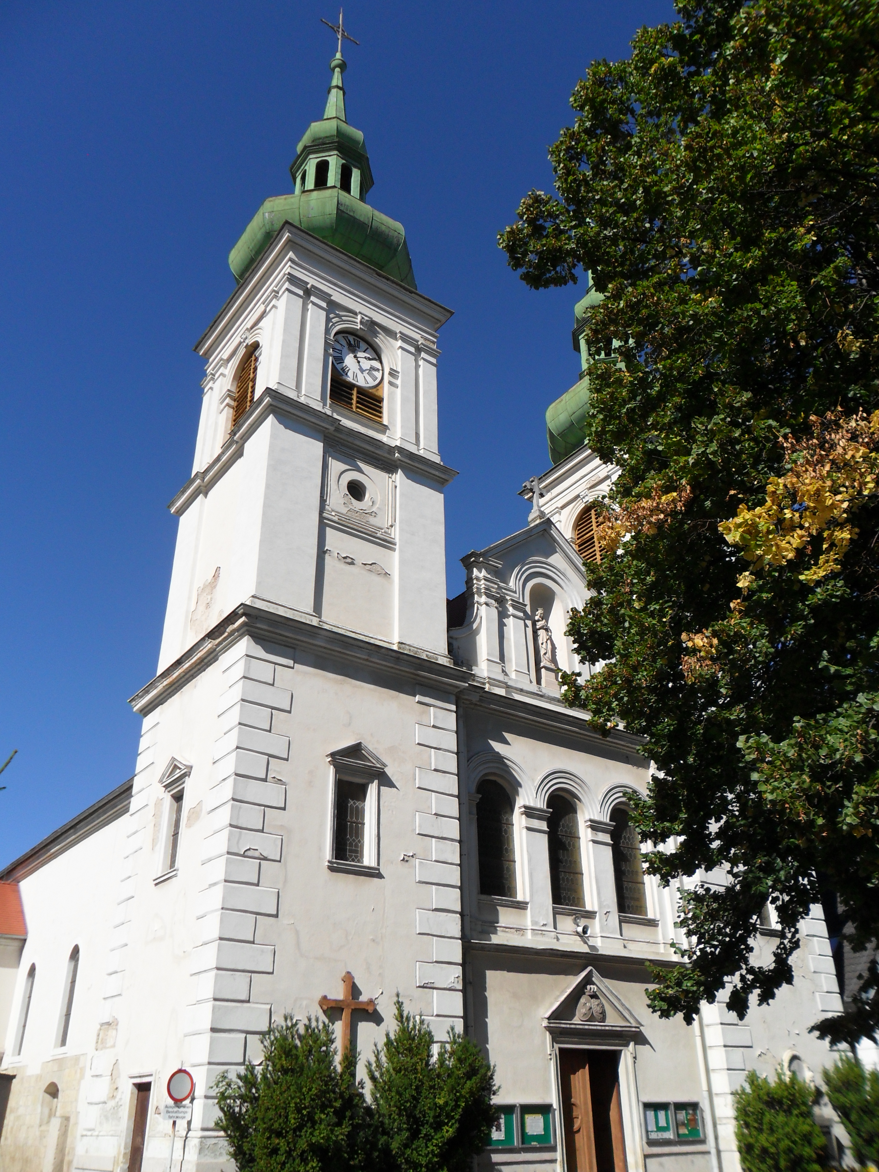 Kath. Pfarrkirche hl. Johannes der Täufer, Wallfahrtskirche Maria vom Guten Rat in Schwarzau am Steinfeld